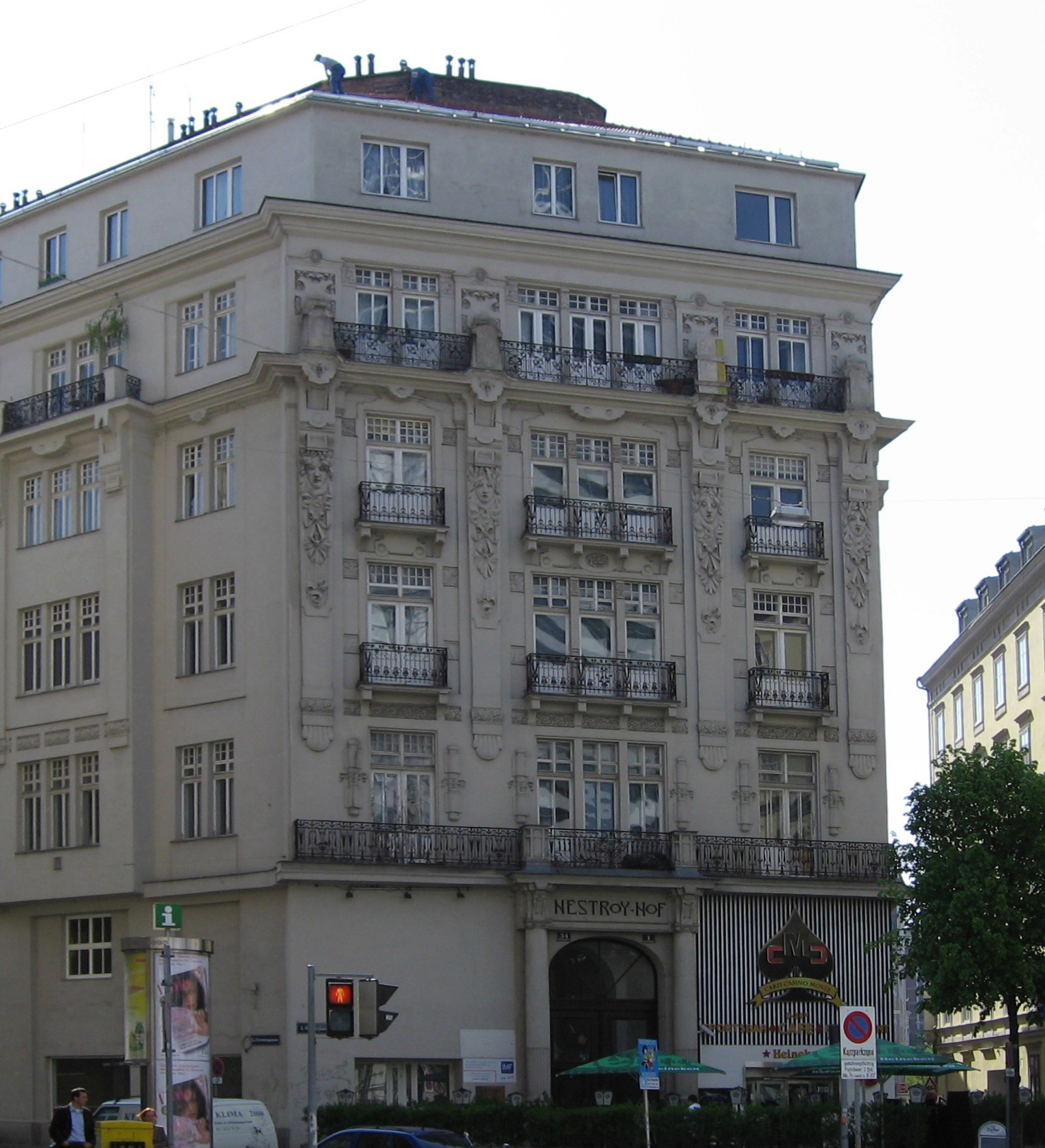 Wien Nestroyhof